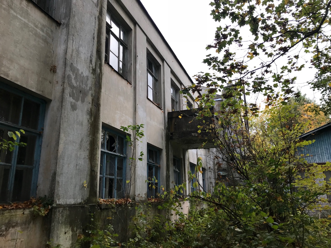 Еще одна фотография фасада противотуберкулезного диспансера в Родниках